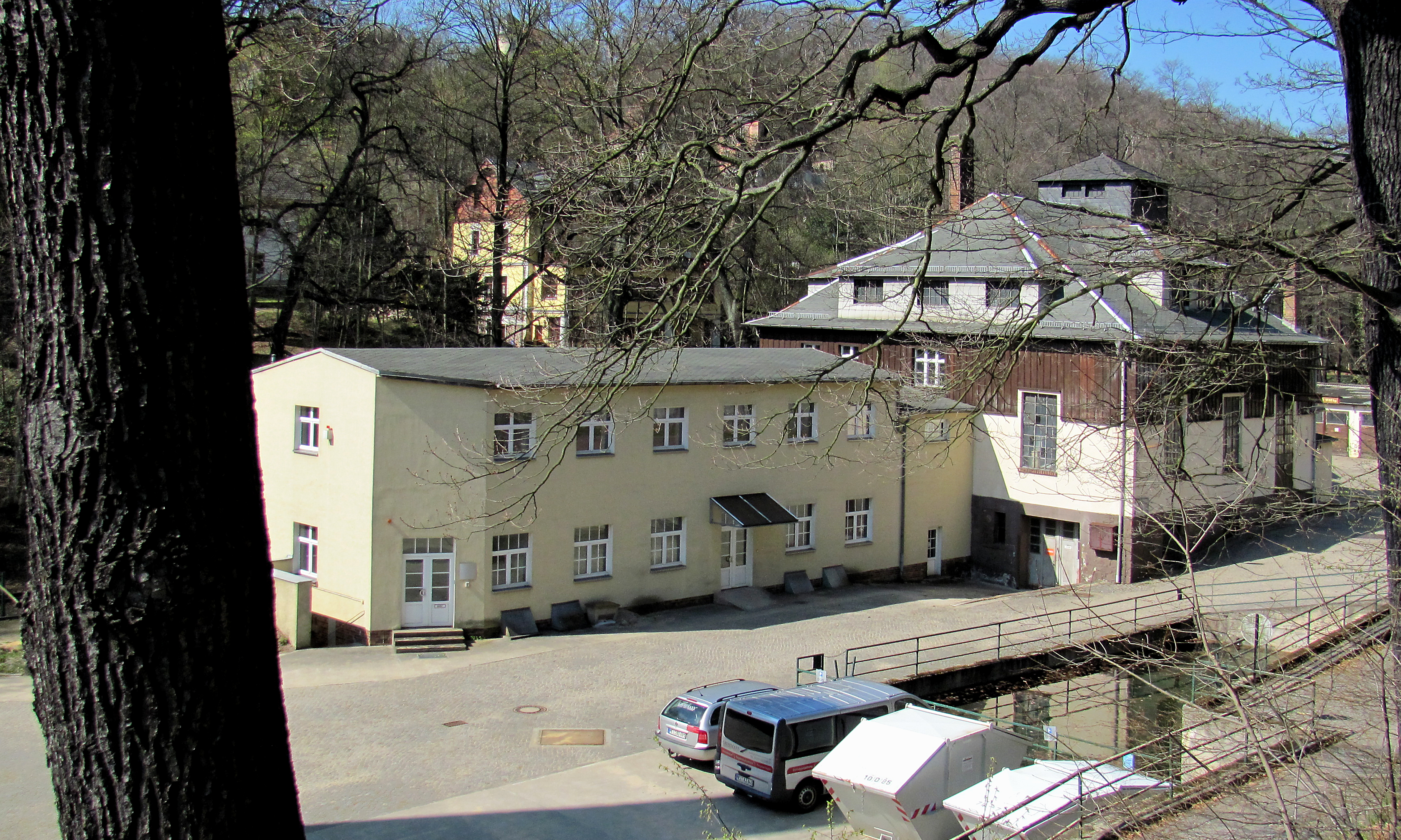 Radebeul, Elektrizitätswerk Niederlößnitz, Haus C und D